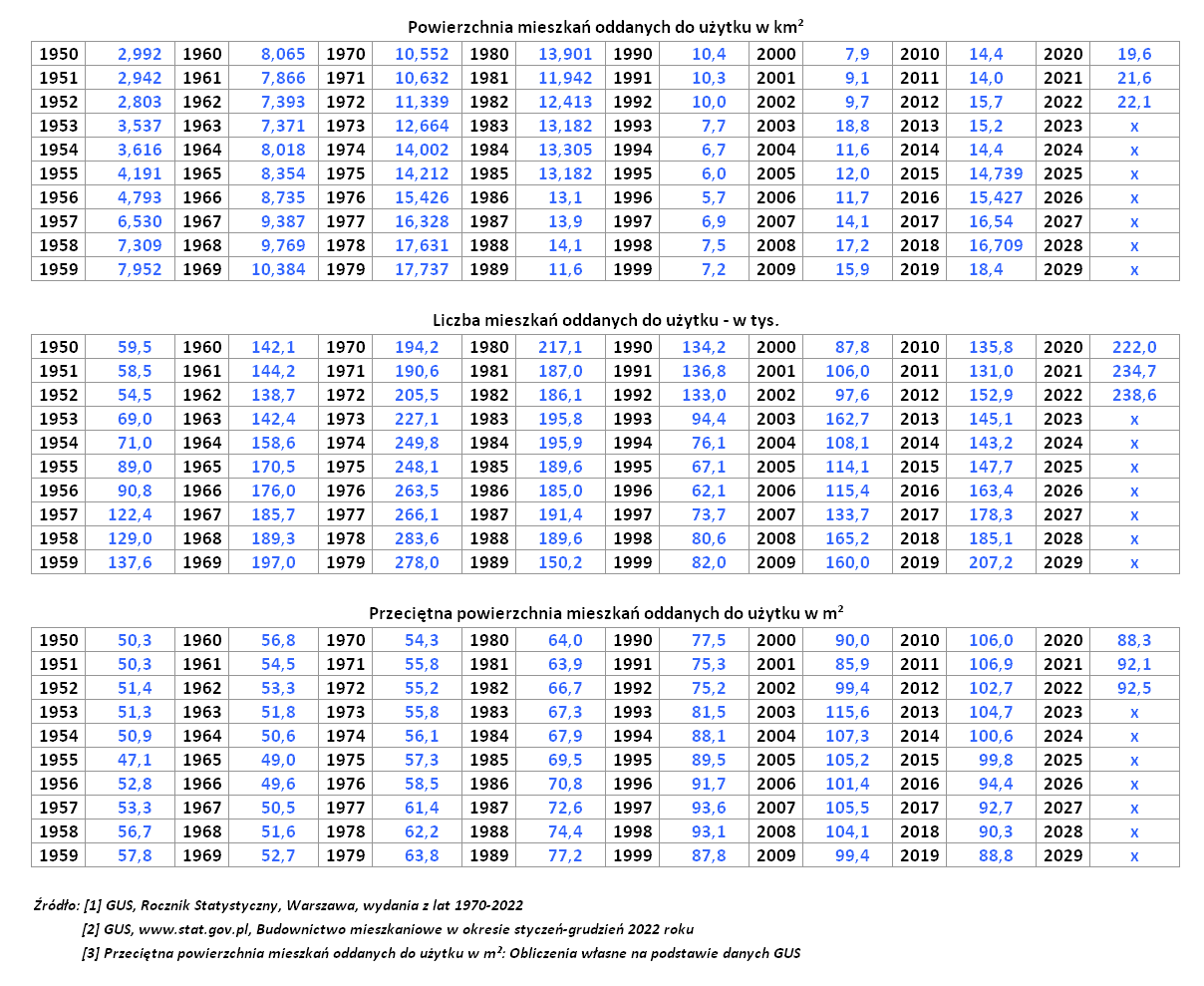 Powierzchnia i liczba mieszkań oddanych do użytku w Polsce od 1950 r. Źródło: [1] GUS, Rocznik Statystyczny, Warszawa, wydania z lat 1970-2017 [2] GUS, Budownictwo mieszkaniowe I–IV kwartał 2017 r., Warszawa 2018 [3] Przeciętna powierzchnia mieszkania oddanego do użytku w m²: Obliczenia własne na podstawie danych GUS